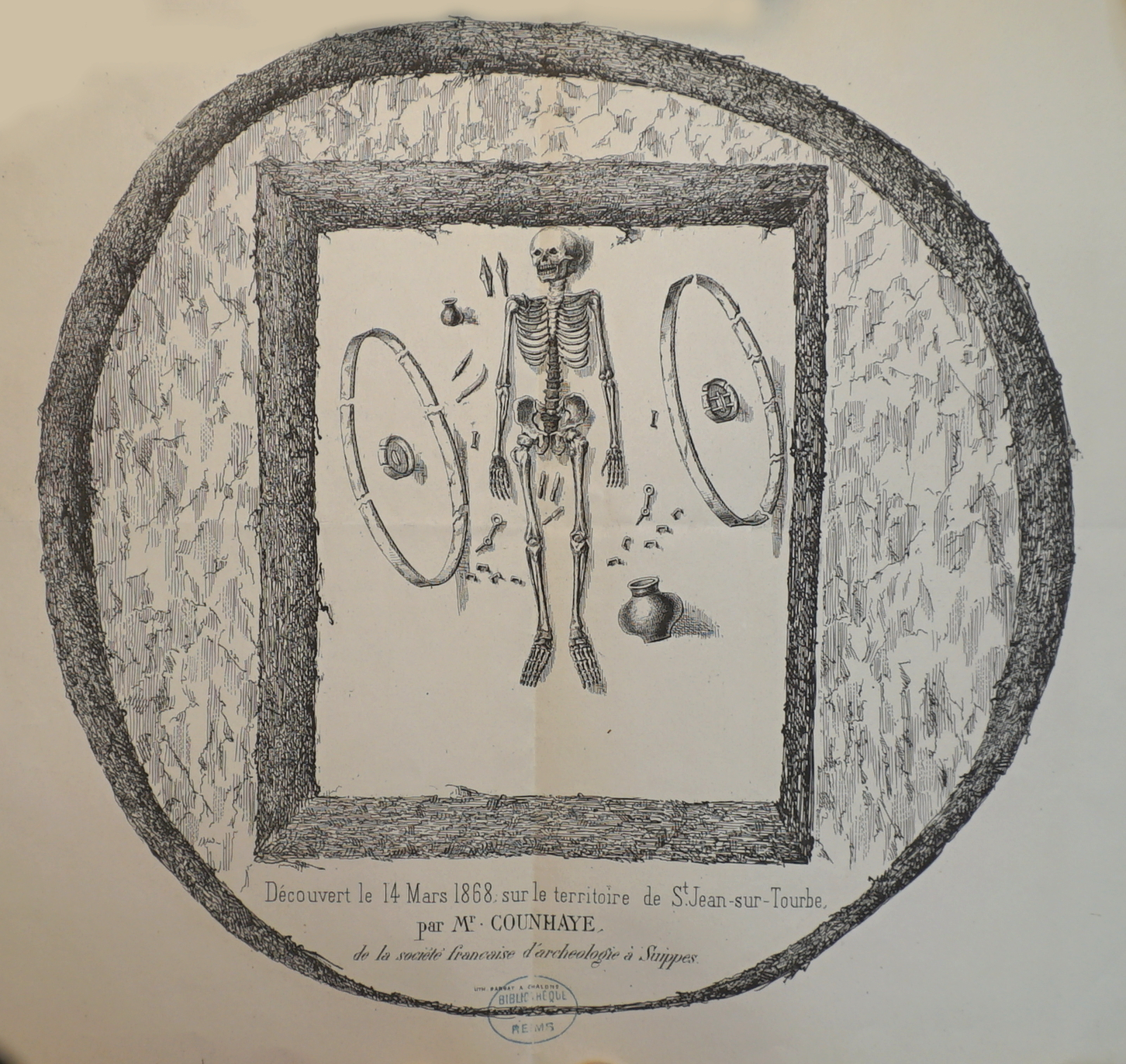 fouille de tombe gauloise.